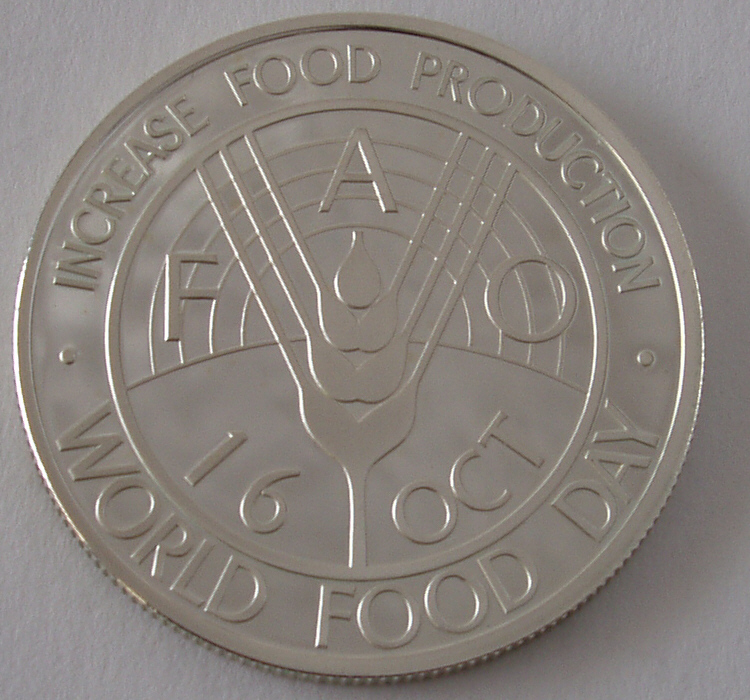 Afghanistan, 500 Afghanis, 1981, back, d=27 mm, 925/1000 silver